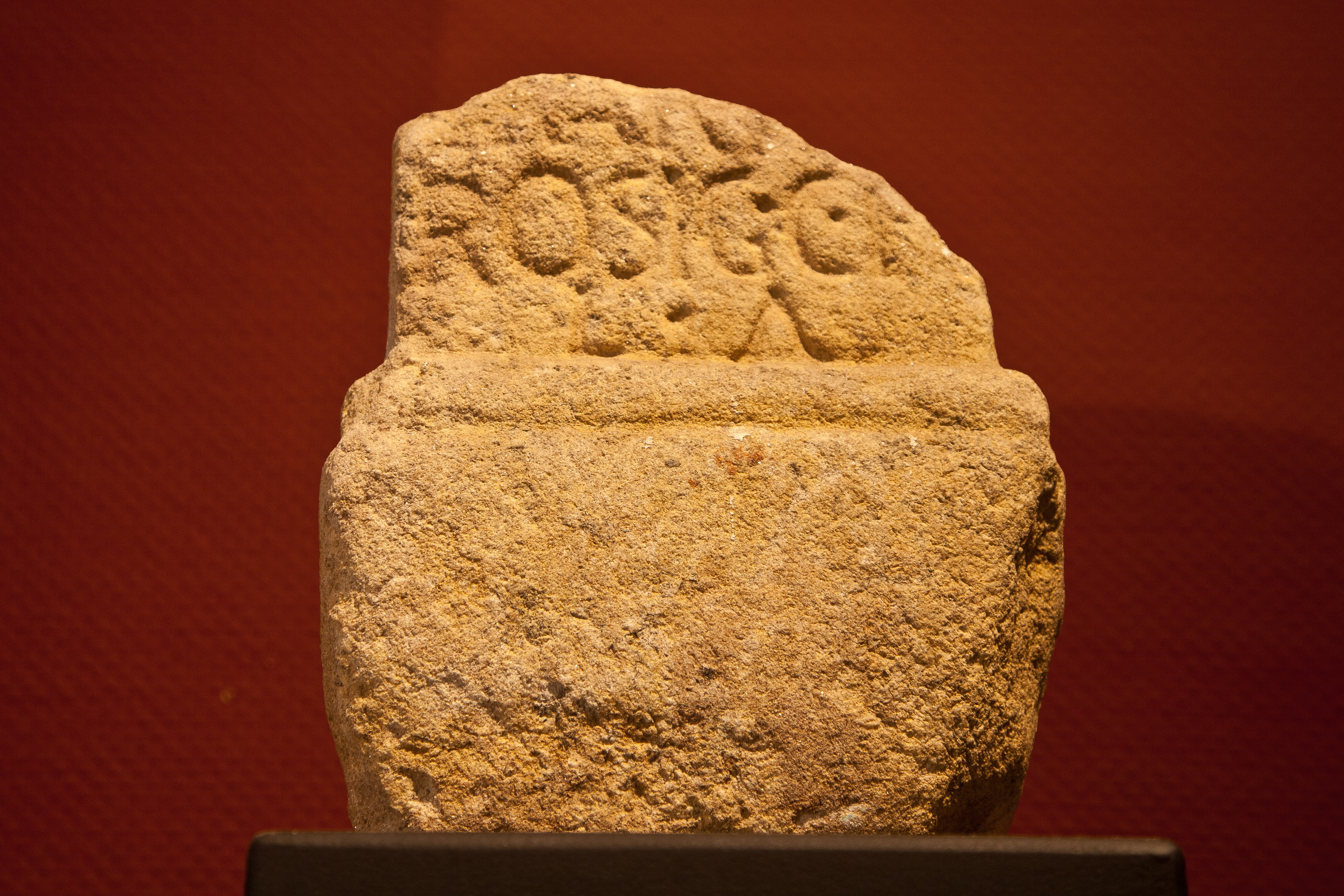 [...] RI [...]/RO SIG(nifero)/ C(ohortis) I C(eltiberorum)/ L(ibens) A(nimo) ...ri...ro [?] signífero da Iª Cohorte dos Celtíberos, de libre vontade (cumpriu o seu voto) Procedencia: Campamento romano de Cidadela, Sobrado dos monxes, A Coruña. s. II d.C. AE 1984, 548 = AE 1989, 43 = CIRG 1, 32 = Signífero: Soldado portaestandartes